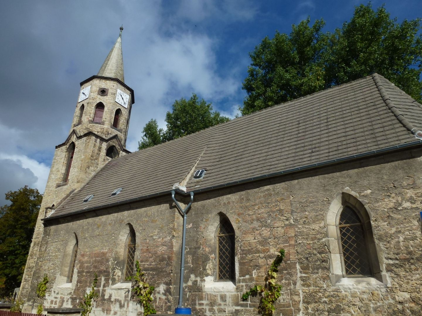 Kirche in Lunstädt